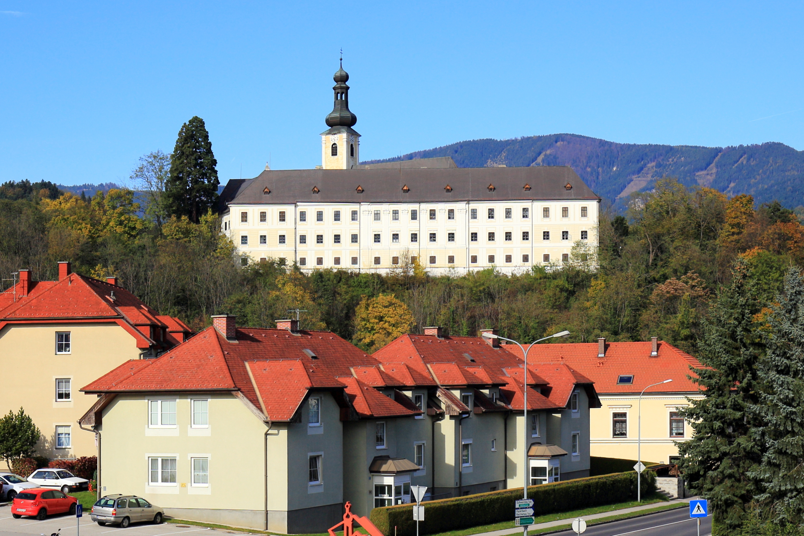 Südostansicht des Schlosses Gloggnitz.